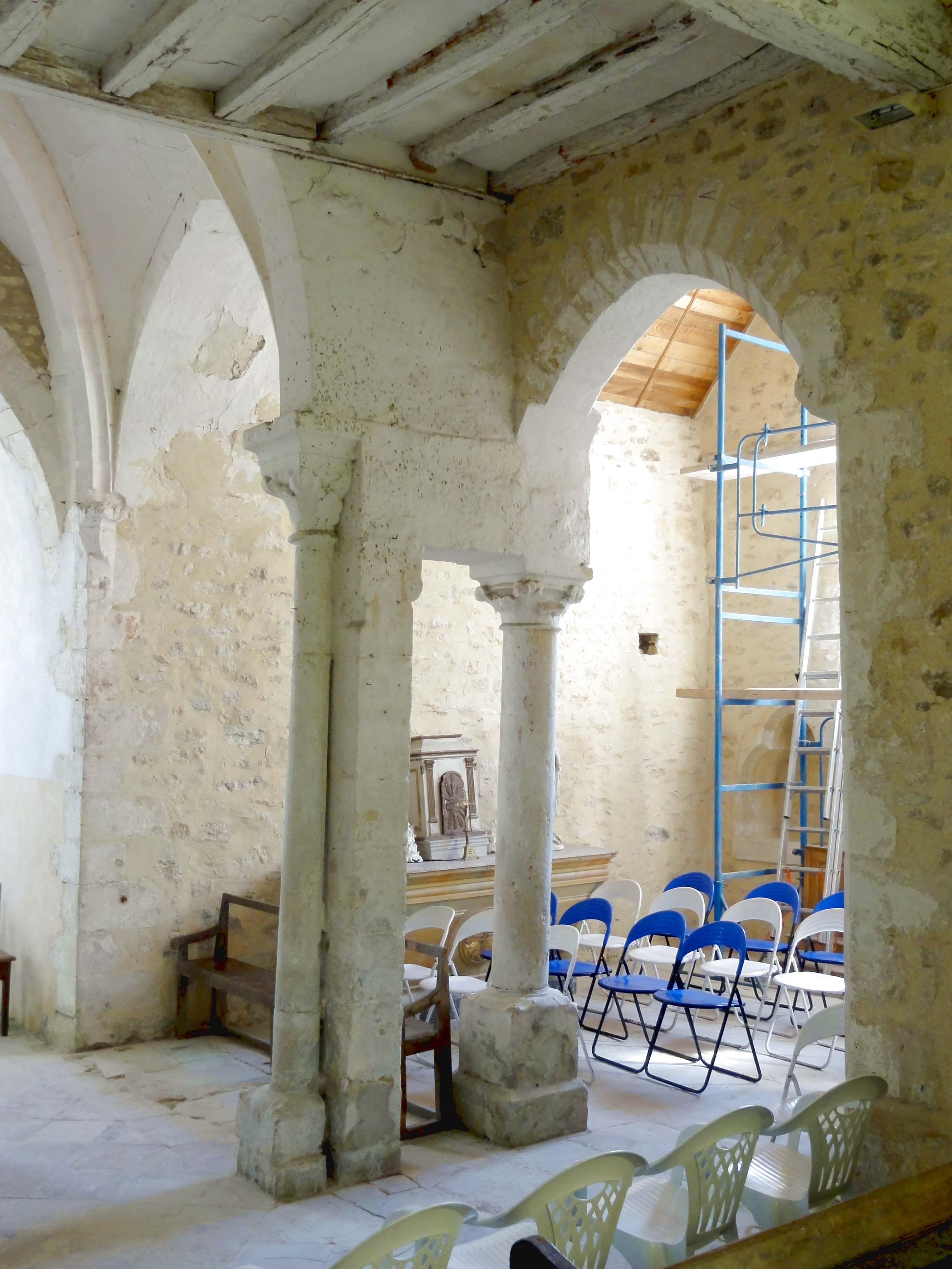 Intérieur de l'église - voir tire.